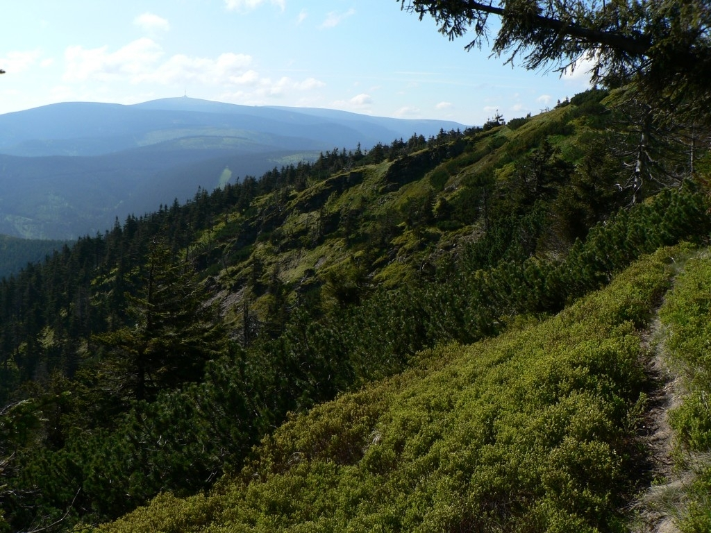 Ve Sněžné kotlině na východních svazích Červené hory, v pozadí Praděd.